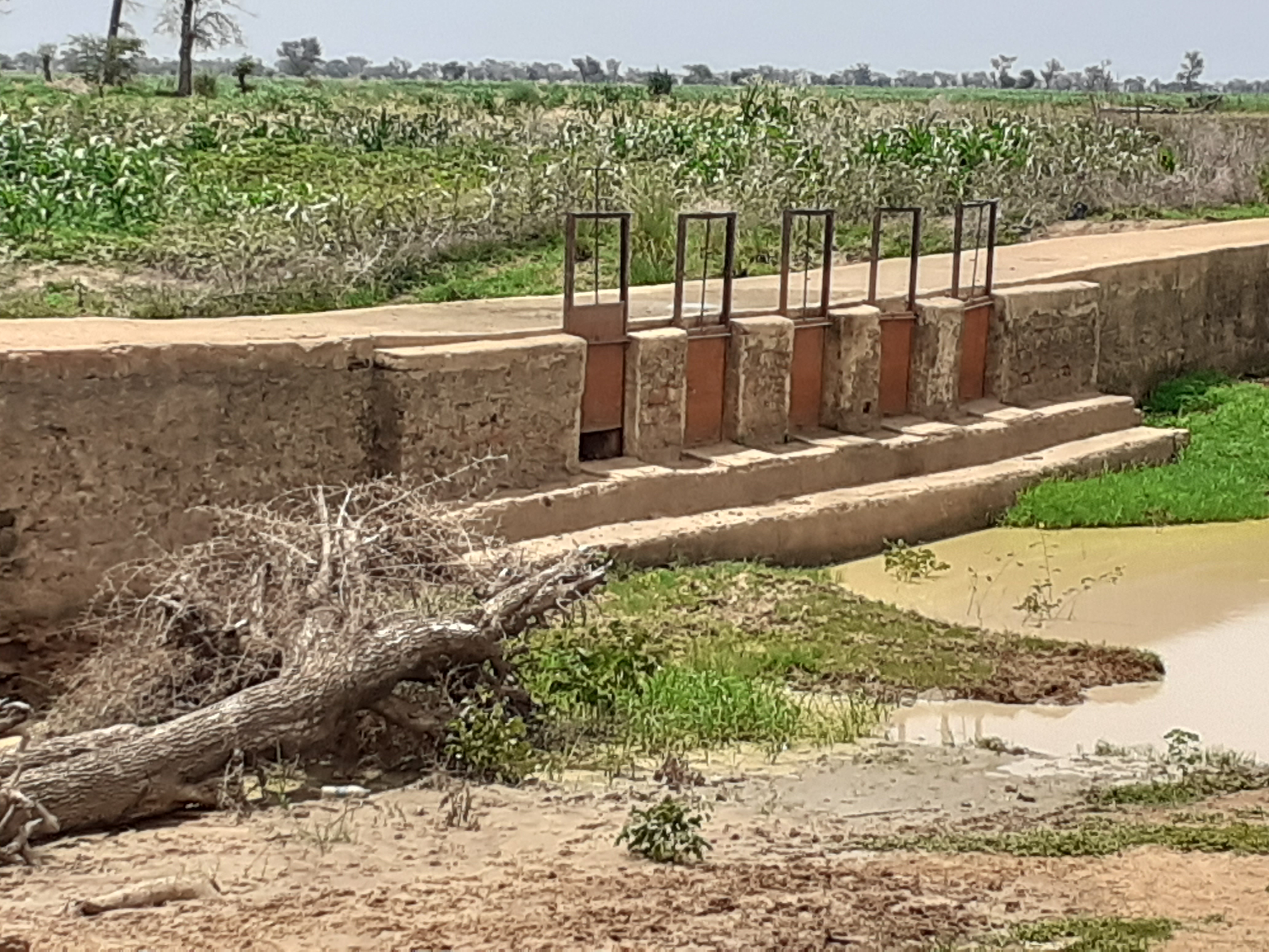 Barrage d'eau de Bidim Cameroun zone frontalière avec le Tchad.